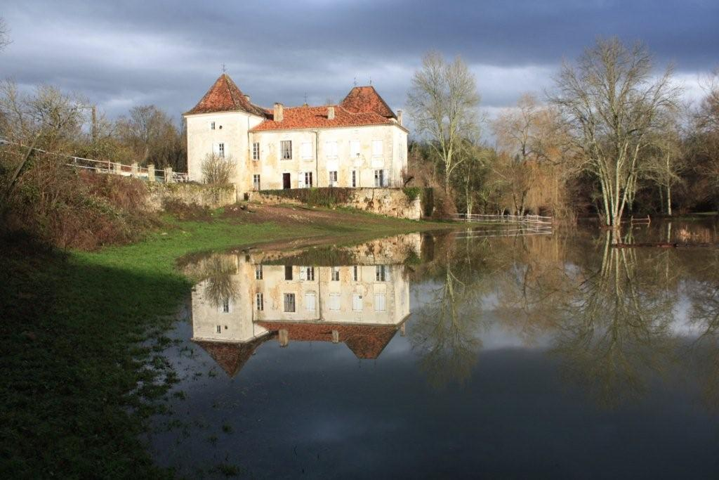 Château de Beaurecueil (Saint-Sulpice-de-Mareuil, Dordogne, France) l'hiver, après le débordement de la rivière Nizonne.